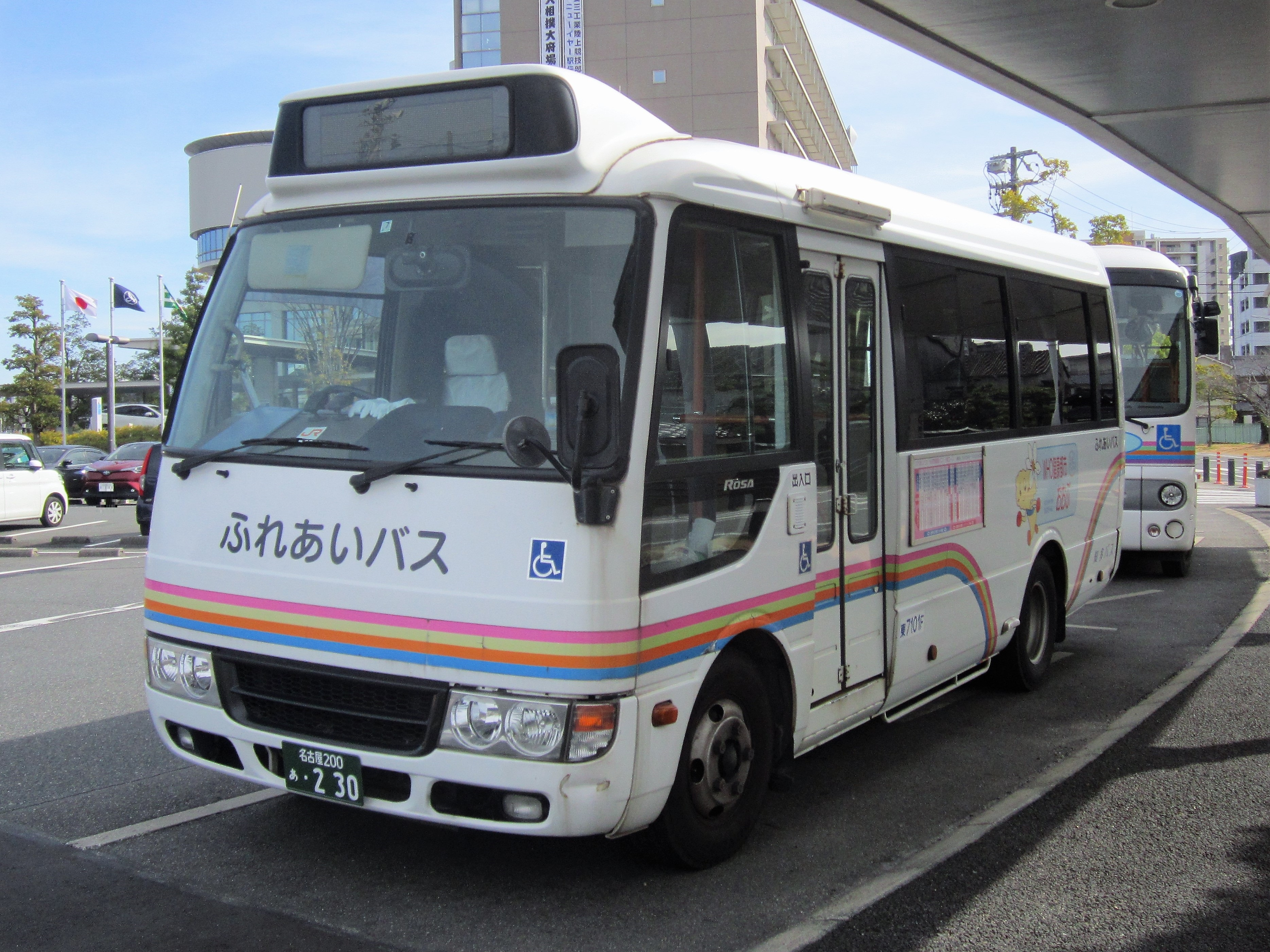 大府市役所付近に停車中の大府市循環バス「ふれあいバス」